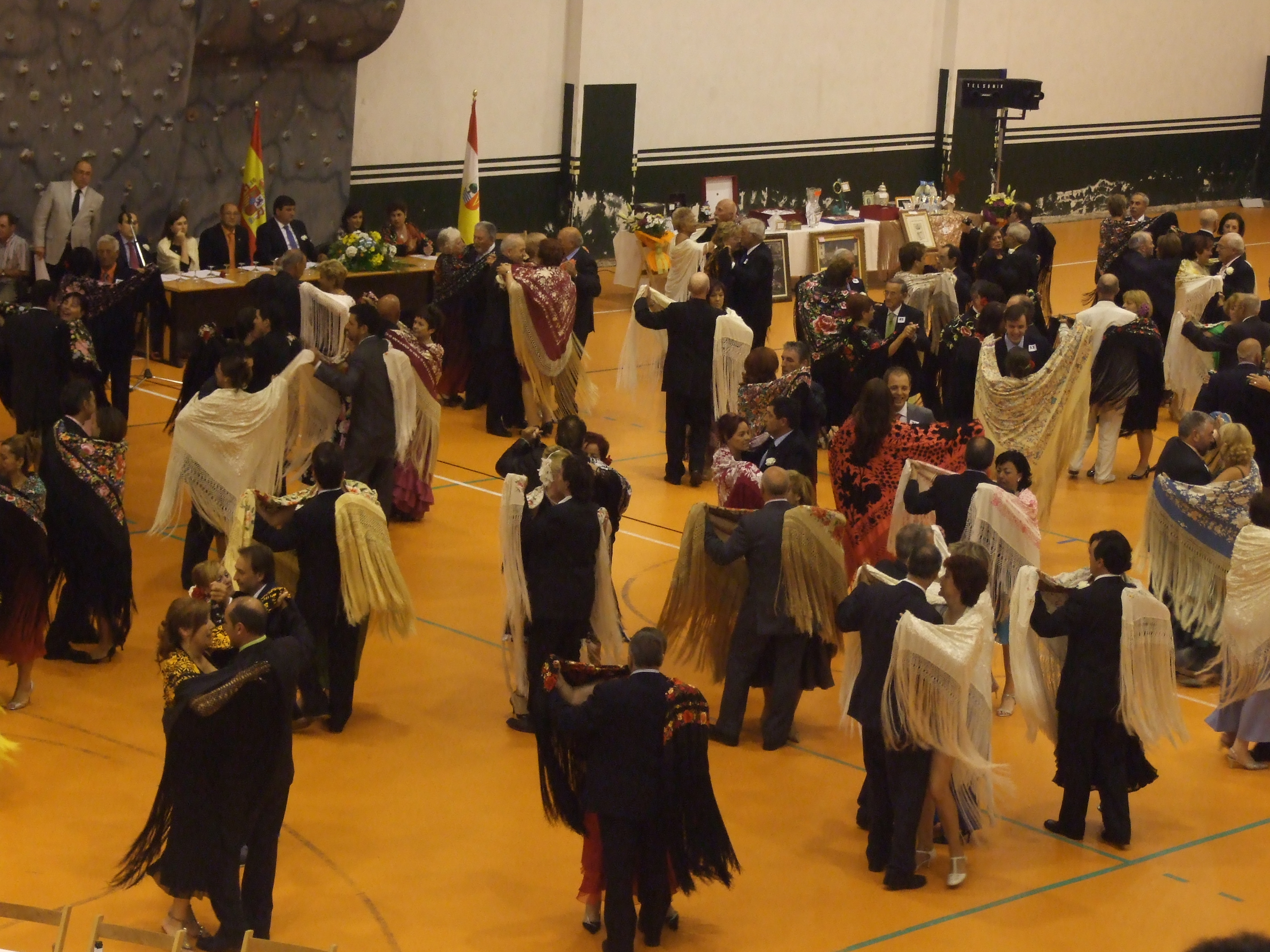 Verbena del Mantón en Ramales de la Victoria This is a photography of a Folklore festival in Spain (Wikidata id Q23657189).